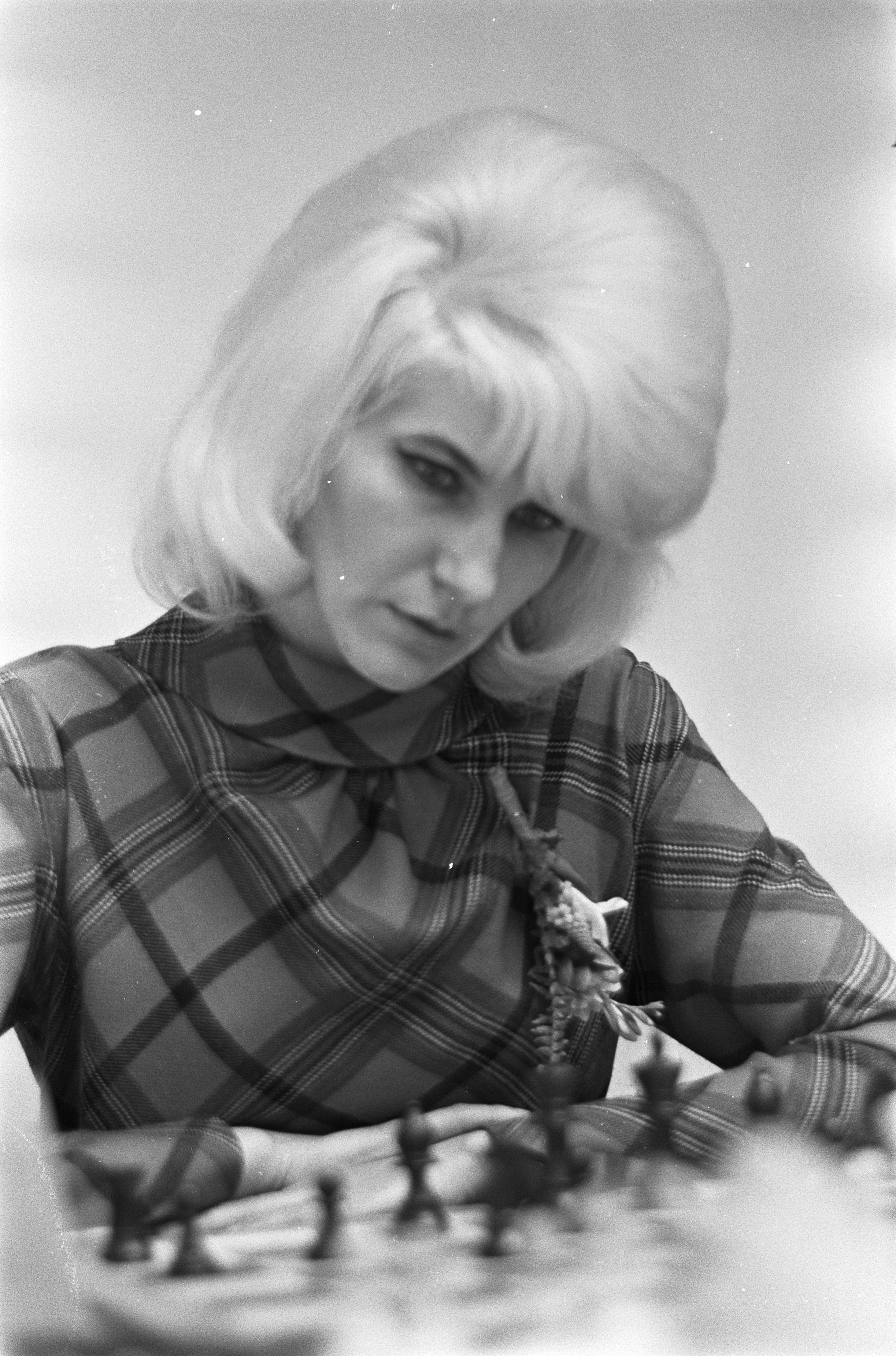 Collectie / Archief : Fotocollectie Anefo Reportage / Serie : [ onbekend ] Beschrijving : Hoogovenschaaktoernooi, de dames van start, mejuffrouw Kowalska uit Polen Datum : 15 januari 1968 Locatie : Polen Trefwoorden : schaken Instellingsnaam : Hoogovenschaaktoernooi Fotograaf : Koch, Eric / Anefo Auteursrechthebbende : Nationaal Archief Materiaalsoort : Negatief (zwart/wit) Nummer archiefinventaris : bekijk toegang 2.24.01.05 Bestanddeelnummer : 920-9883